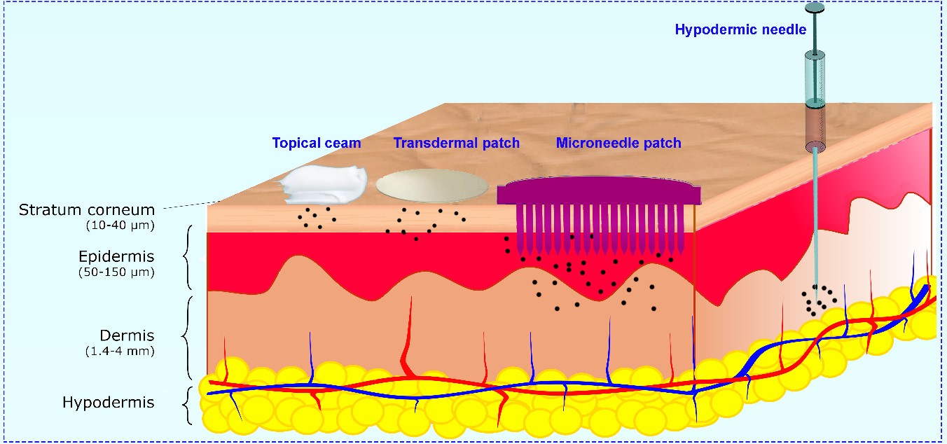 Схематичное изображение глубины введения активной субстанции при ее нанесении с помощью (слева направо) кремов, трансдермальных аппликаторов, микроигольных аппликаторов и стандартных инъекционных игл